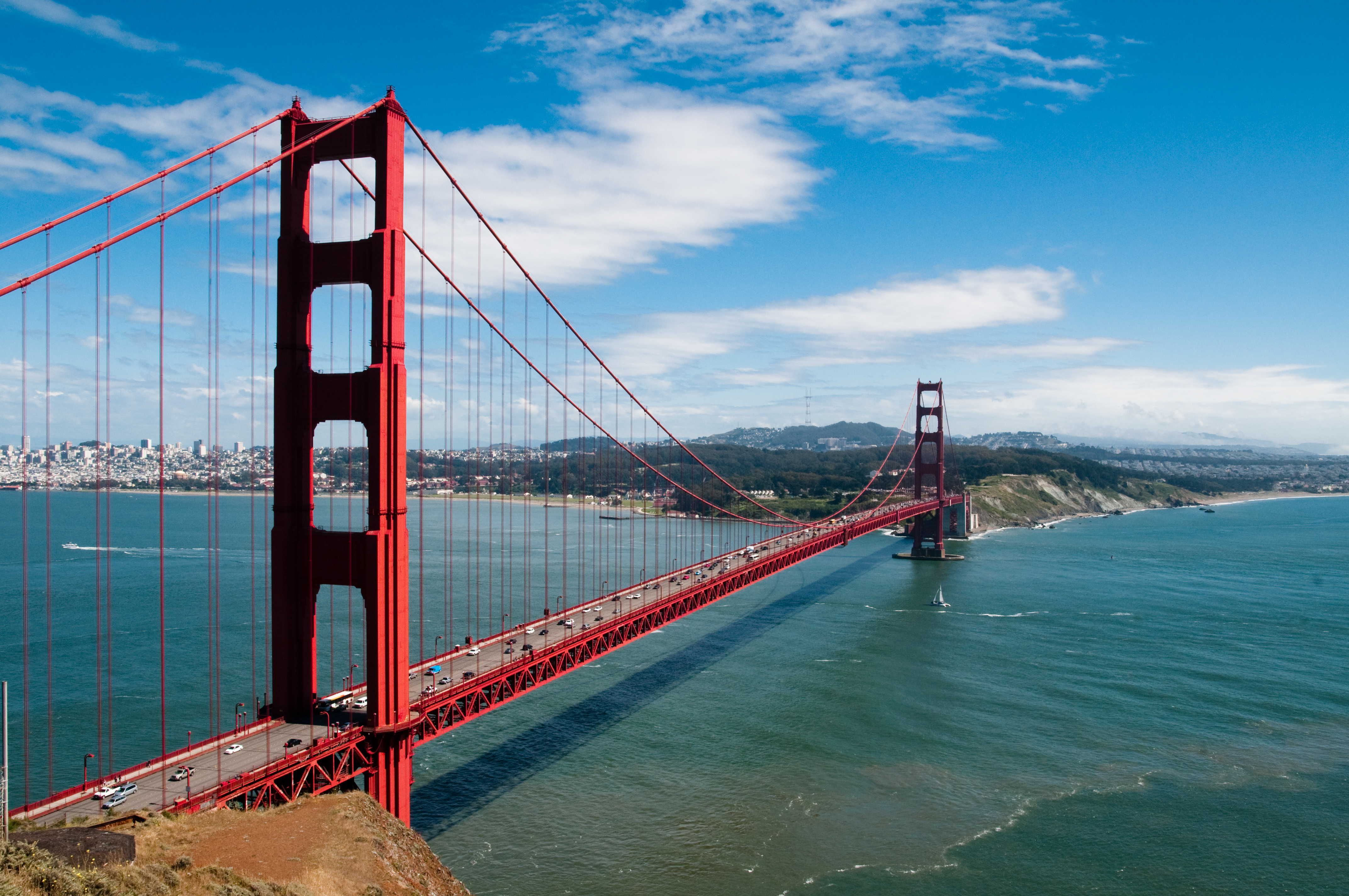 Frisco Frisco Frisco Frisco Frisco Frisco Frisco Frisco Frisco Frisco Frisco Frisco Frisco Frisco Frisco SO WHAT? Ve más fotos y adelantos exclusivos aquí: Watch more pictures and exclusive previews here